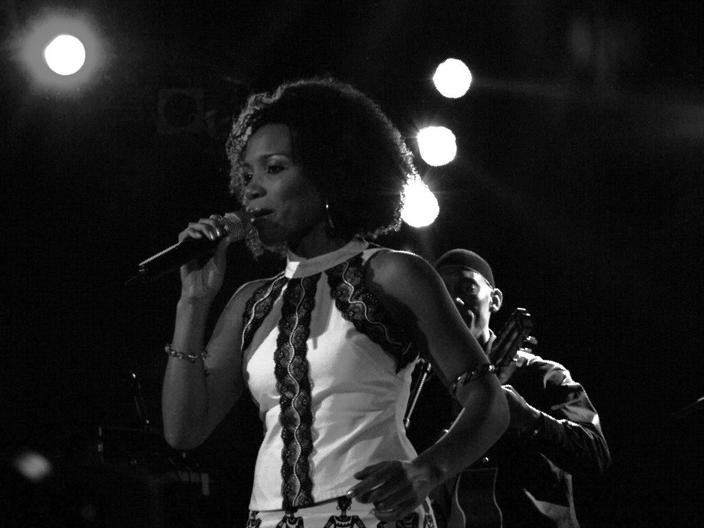 Milano - Italy